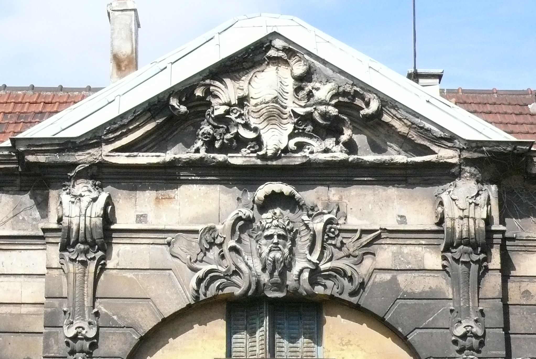 Fronton monumental du Château de la Motte à Stains (Seine-Saint-Denis - France)